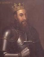 Uma pintura do rei